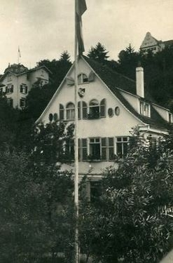 Erstes Verbindungshaus der ATV Arminia zu Tübingen in der Neckarhalde 35. Vorn das ehemalige Haus Neckarhalde 35, das erste Haus der Studentenverbindung ATV Arminia. Oben zu sehen Verbindungshaus A.V. Virtembergia (erbaut 1912) auf dem Schlossberg, darunter links das erste Haus der Virtembergia, Neckarhalde 44, das sie 1899 erworben und 1911 an die Nicaria verkauft hatte. Der erste Bewohner des Hauses war der Maler Christoph Friedrich Dörr, der es 1830 für seine Familie kaufte.